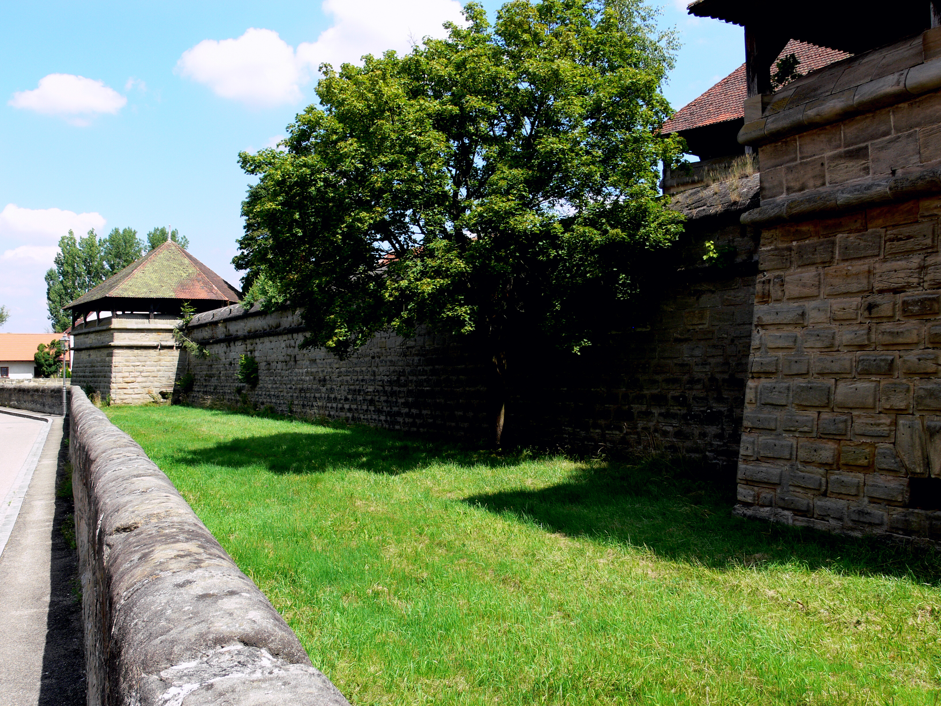 Festung Lichtenau, Lichtenau (Mittelfranken), Landkreis Ansbach